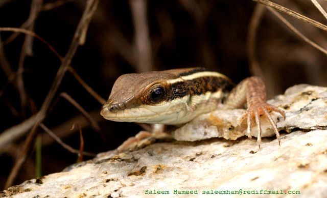 Ophisops leschenaultii, India